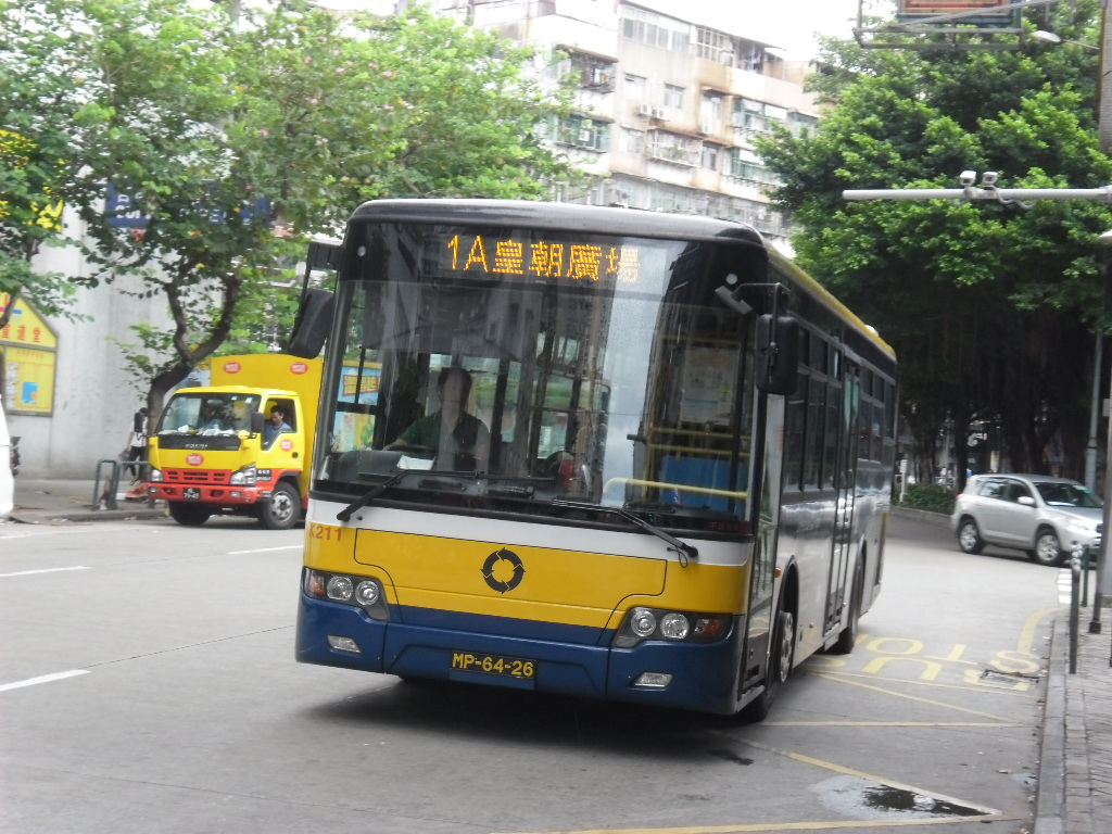 中文（香港）: 新福利1A線，採用2011年蘇州海格KLQ6126G行駛